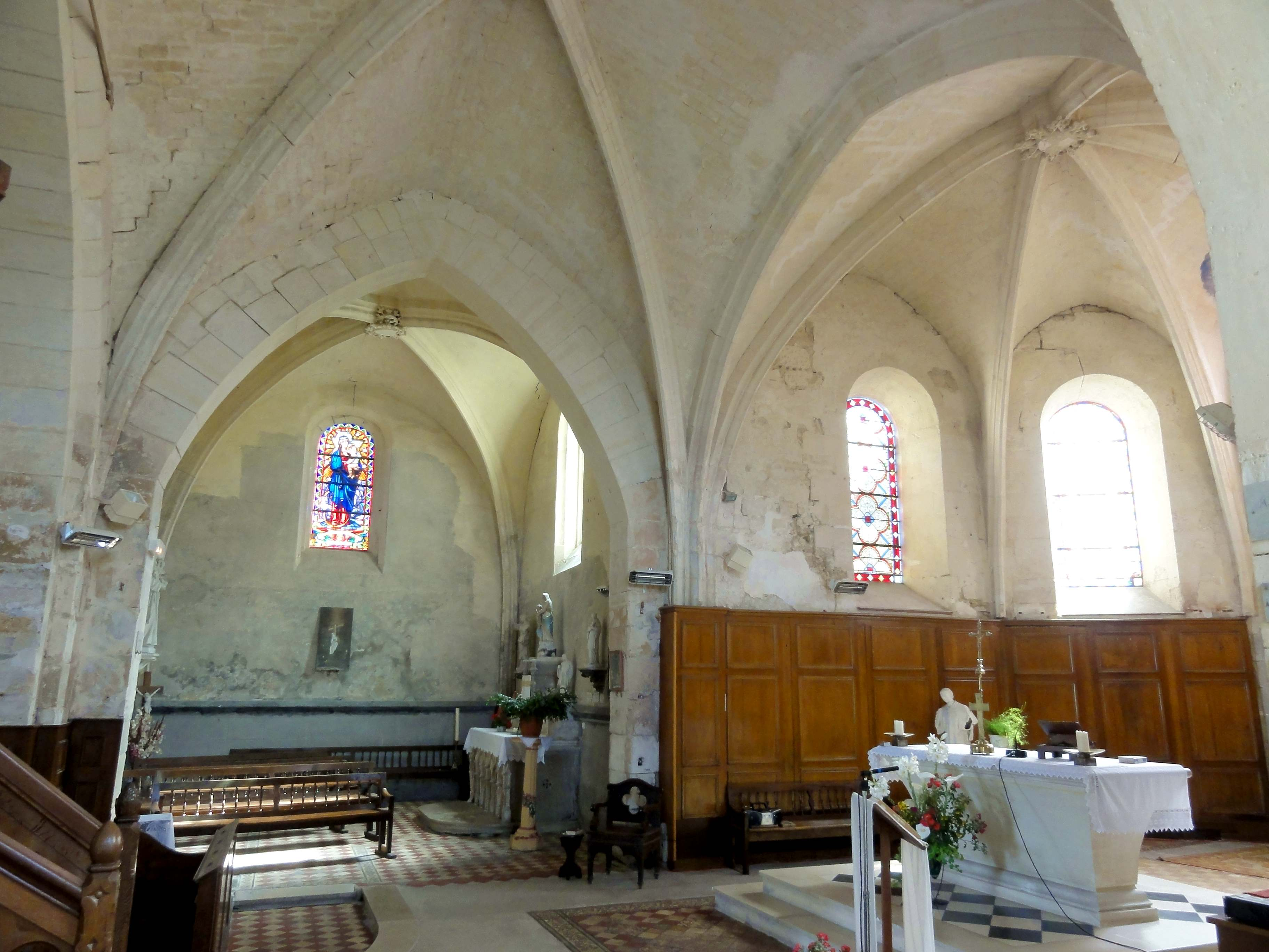 Intérieur de l'église (voir titre).